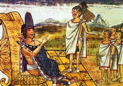 Figure Moctezuma, Códice Diego Durán.